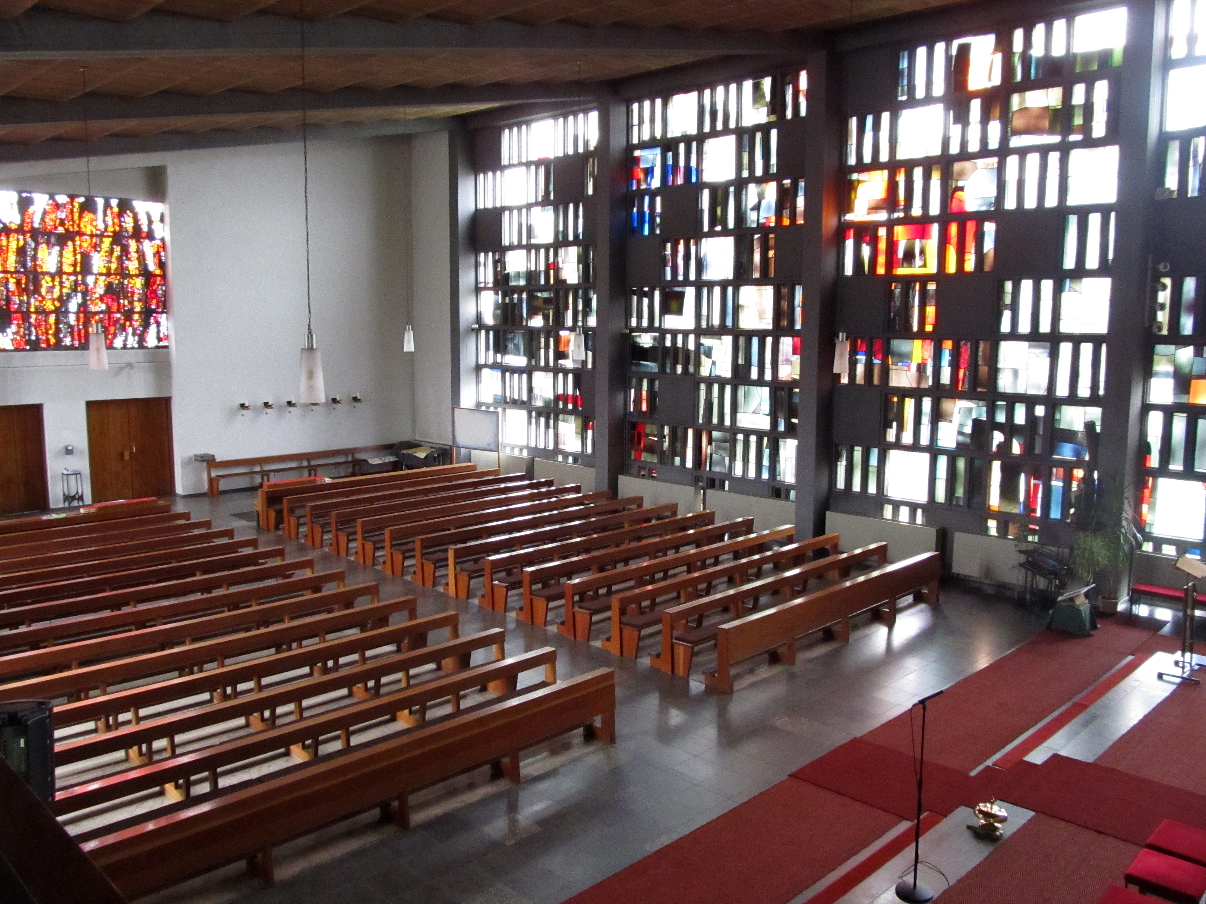 Blick von der Empore der katholischen Pfarrkirche Herz Jesu in Bierbach, einem Stadtteil von Blieskastel, Saarland